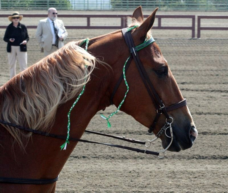 Tennessee Walking Horse